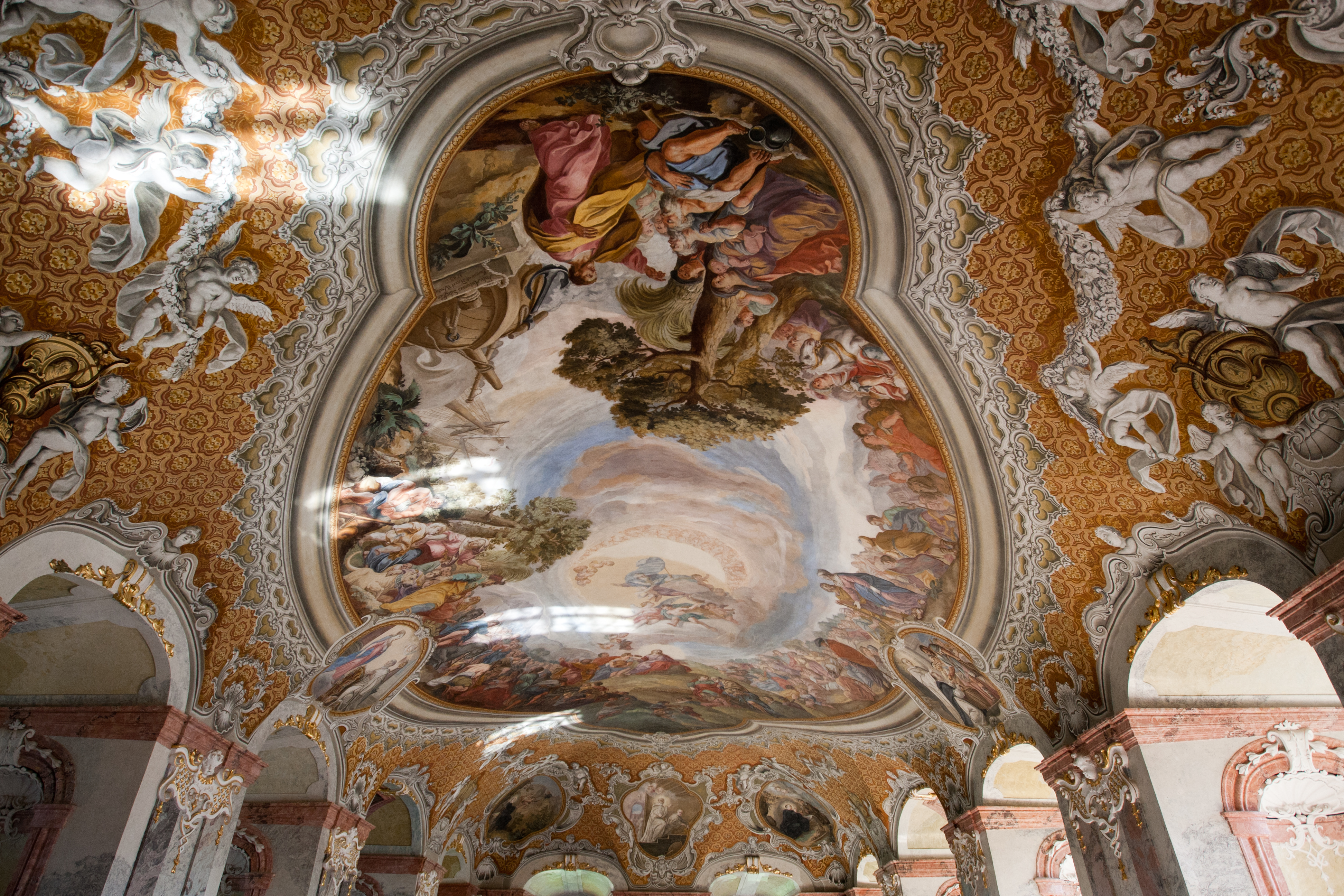 Opactwo cystersów w Lubiążu - refektarz (widok na plafon)